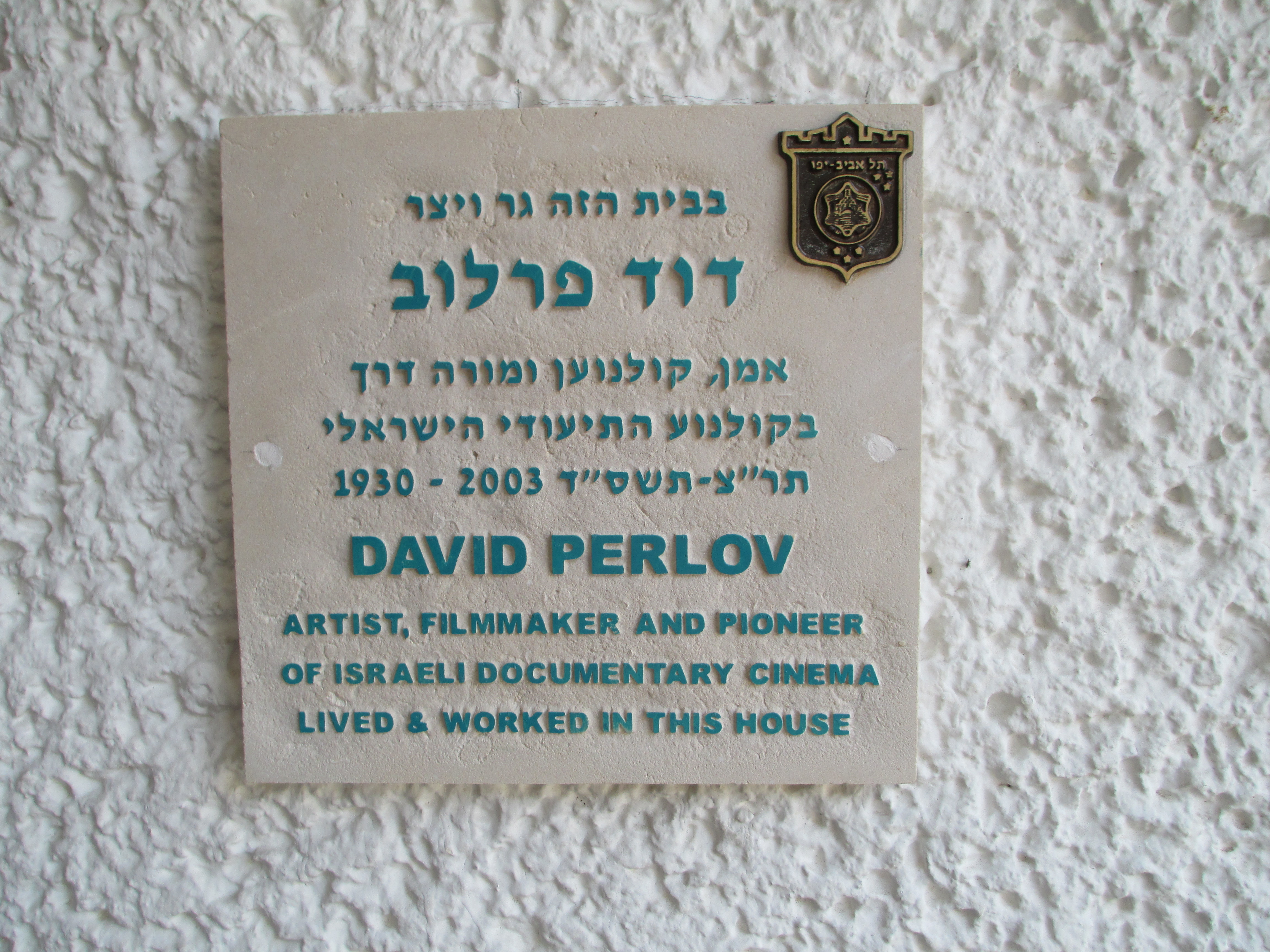 לוחית זיכרון לדוד פרלוב בתל אביב